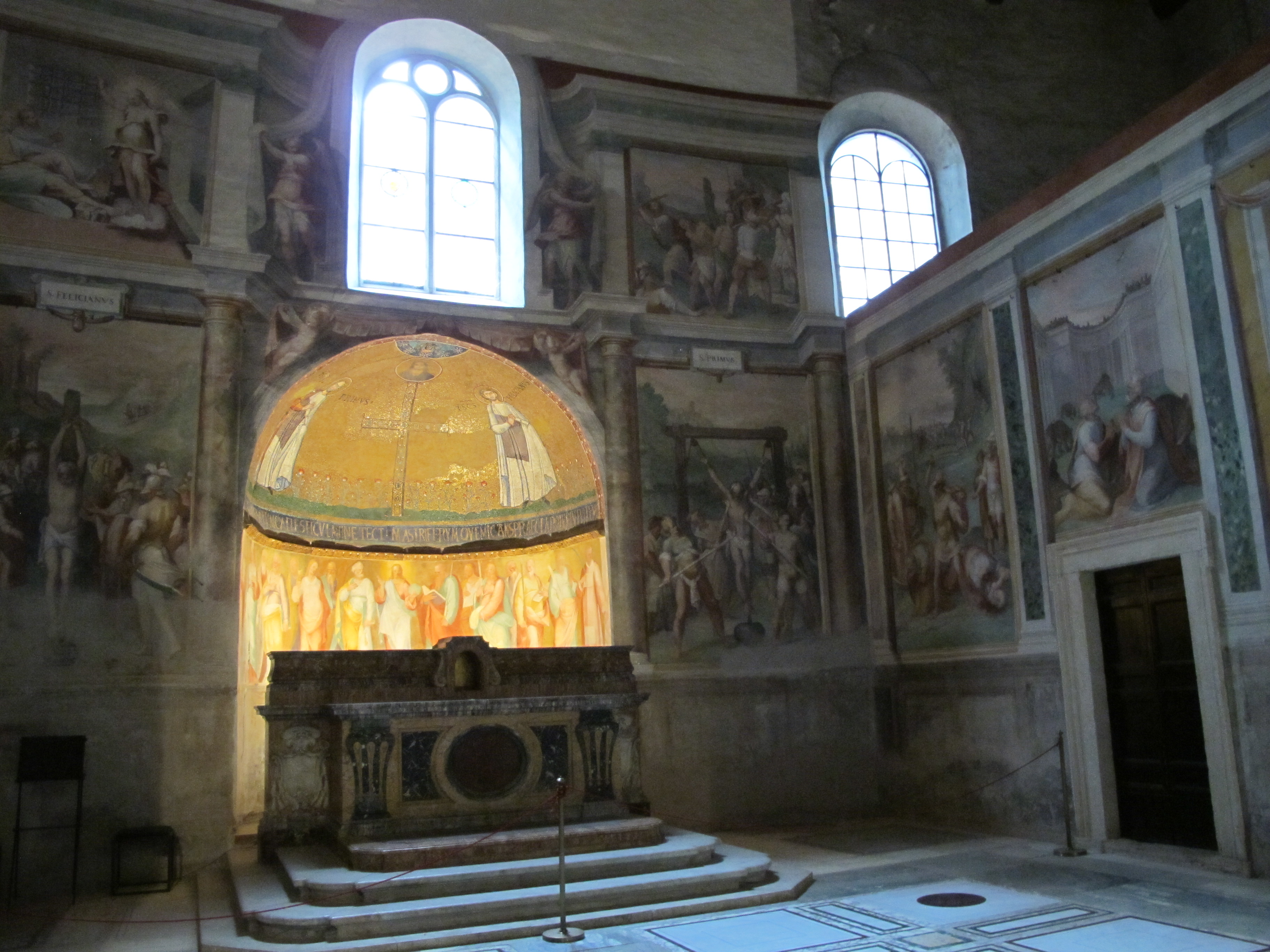 roma, santo stefano rotondo